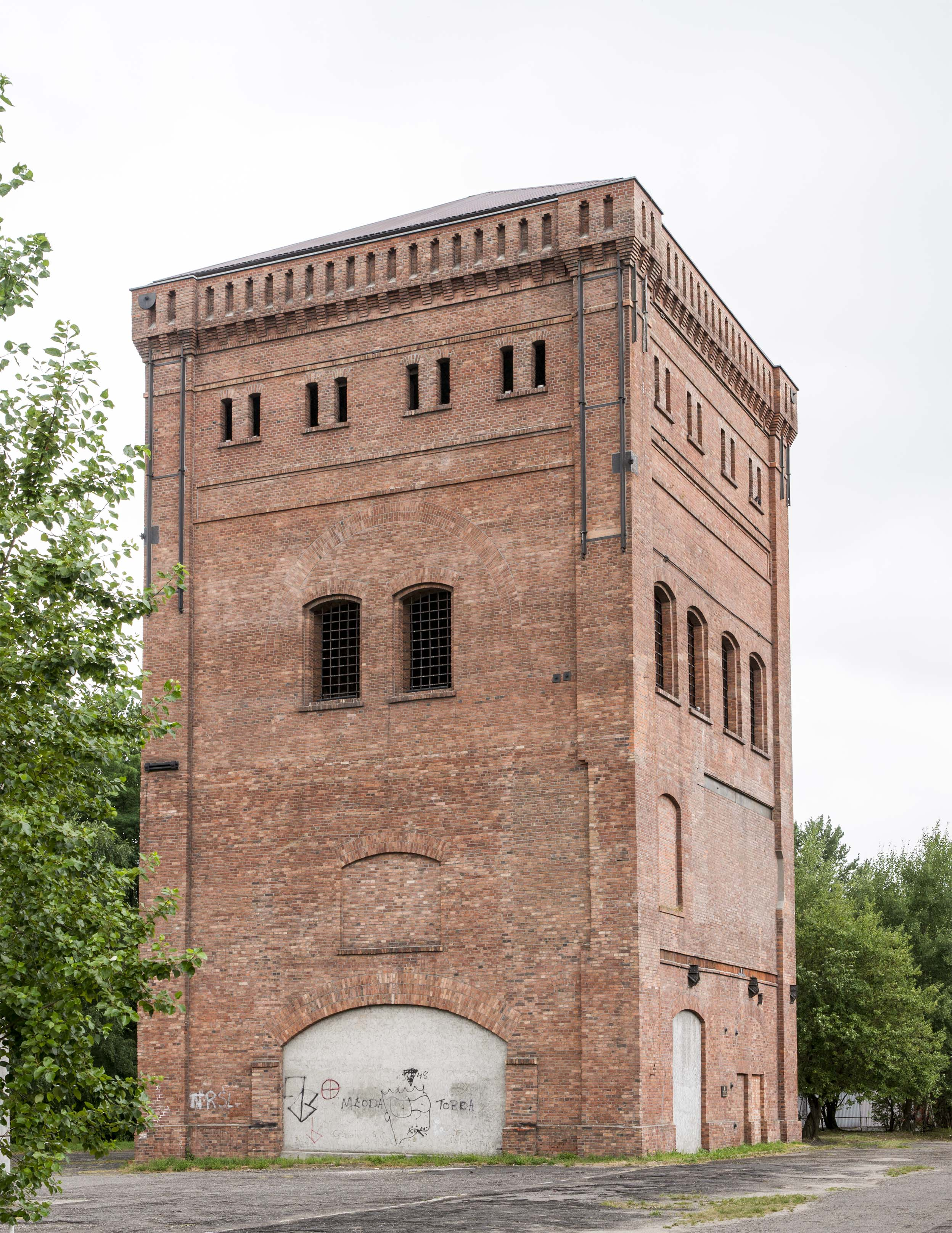 Steinkohlenbergwerk Wanda-Lech, Malakowturm